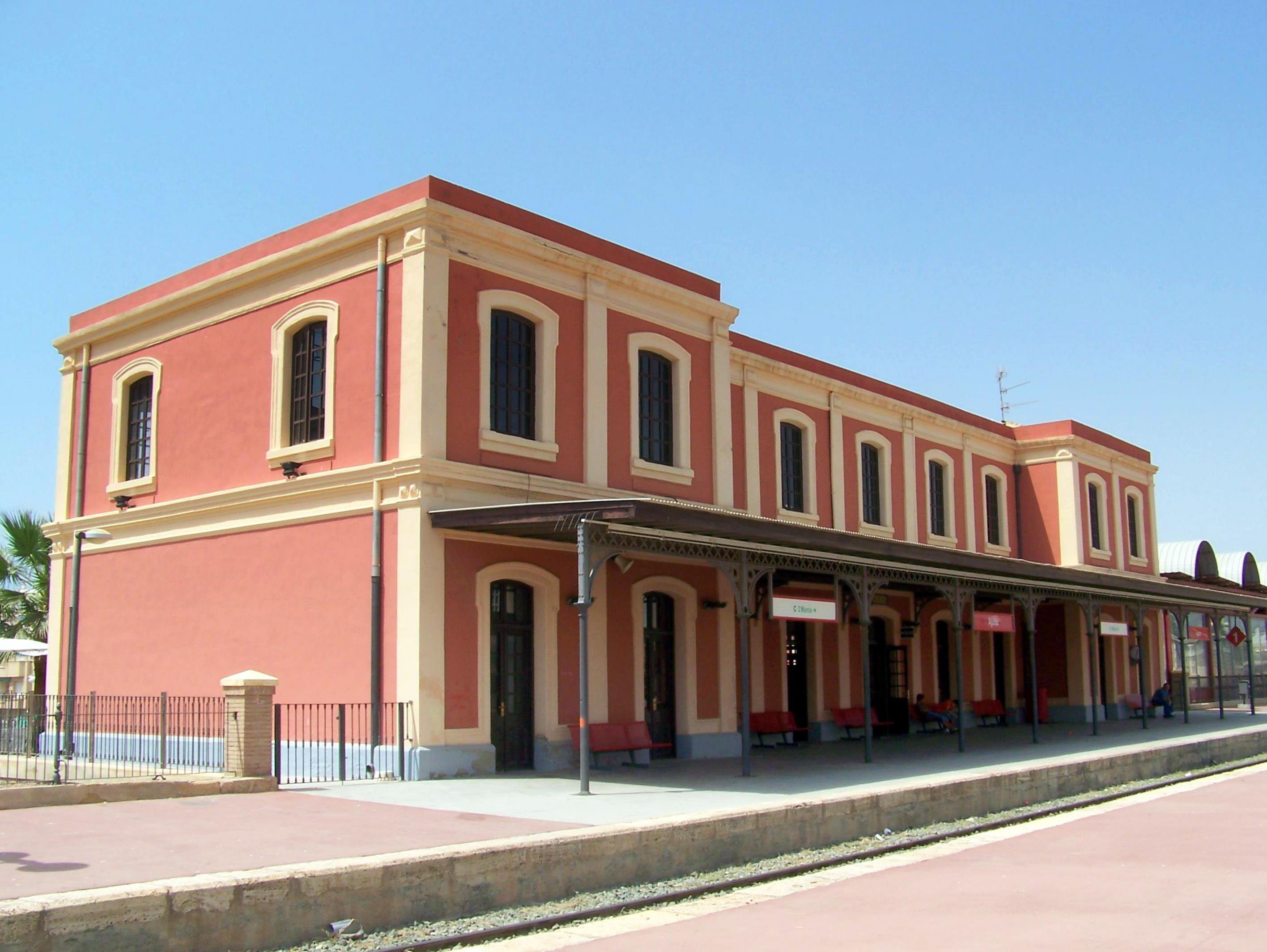 La estación RENFE de FFCC de Águilas (Provincia de Murcia, España) en 2007.